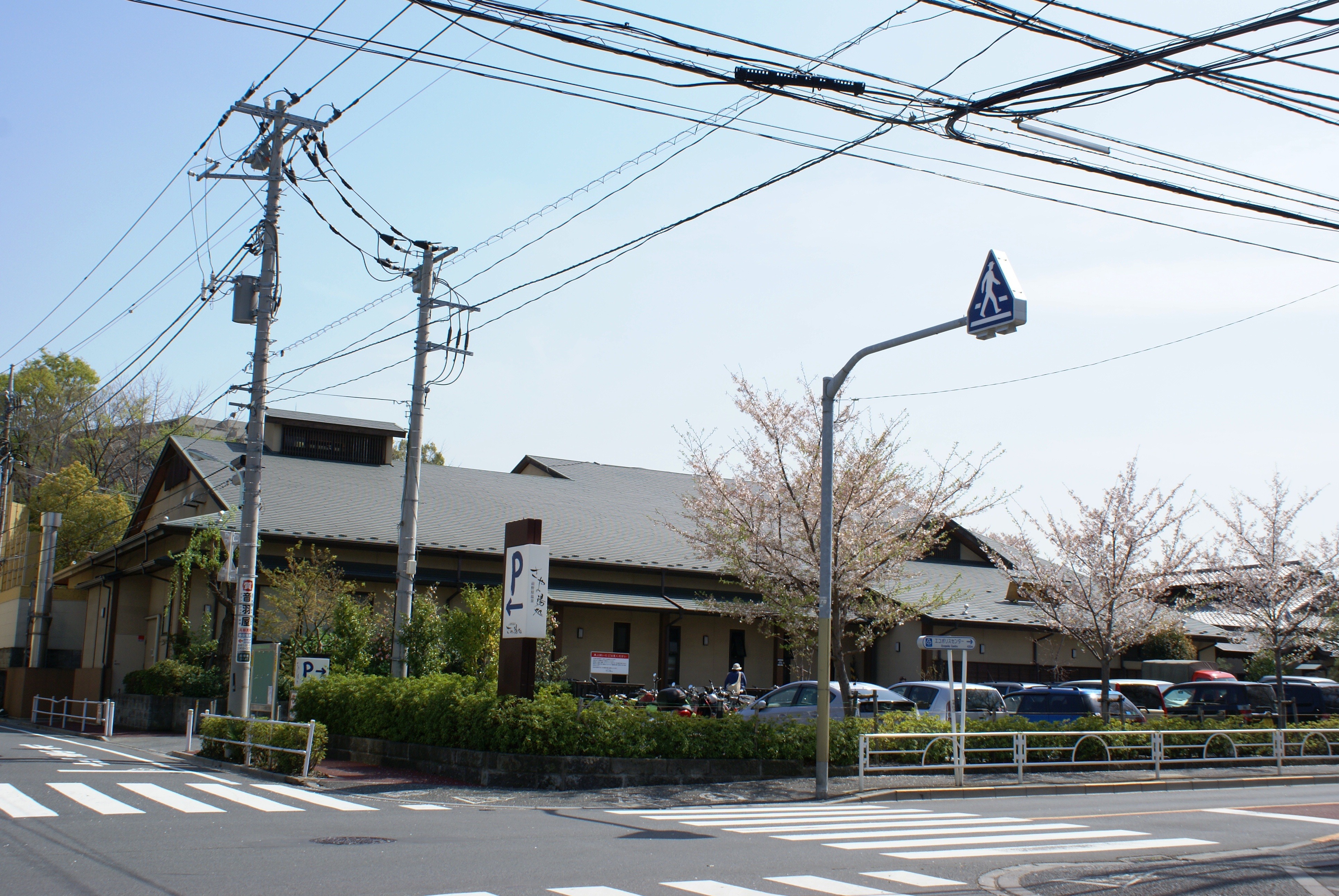 前野原温泉